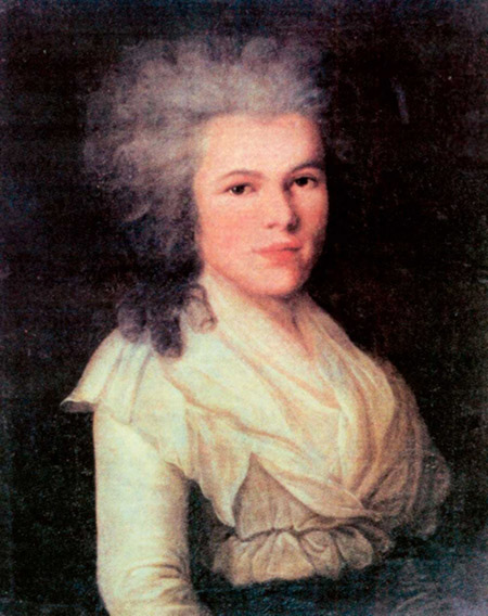 Квашнина-Самарина Елизавета Петровна, дочь действительного тайного советника и президента Юстиц-коллегии П.Ф. Квашнина-Самарина. Фрейлина императрицы Екатерины II (1795). С 1796 жена графа Г.И. Чернышева. Кавалерственная дама ордена святой Екатерины Малого креста. Мать декабриста З.Г. Чернышева и А.Г. Муравьевой, жены декабриста Н.М. Муравьева, разделившей с ним сибирскую ссылку.